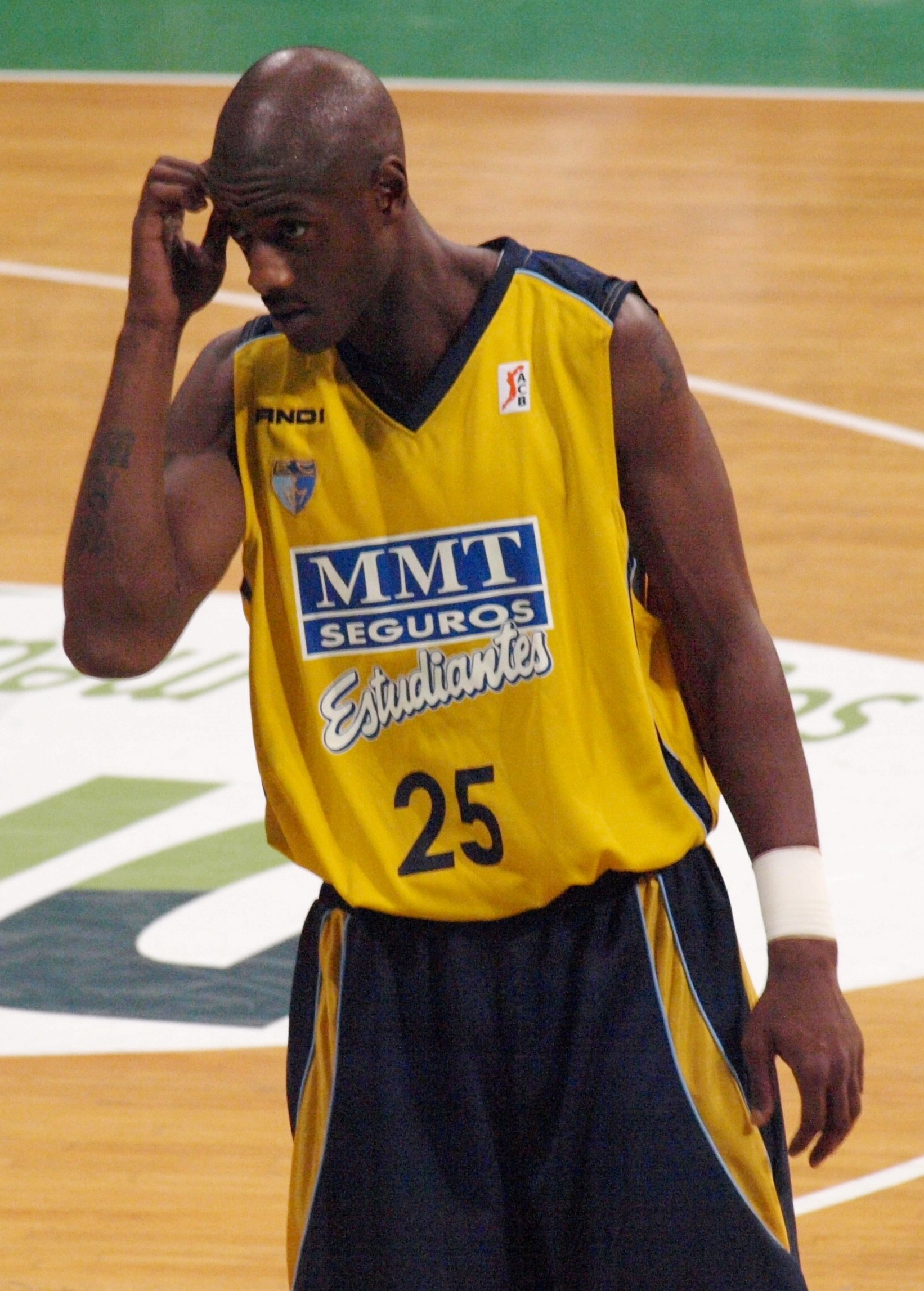 Vonteego Cummings en el partido de la segunda jornada de la liga ACB 2008-09 que enfrentó al Estudiantes y al DKV Joventut en el Olímpico de Badalona.